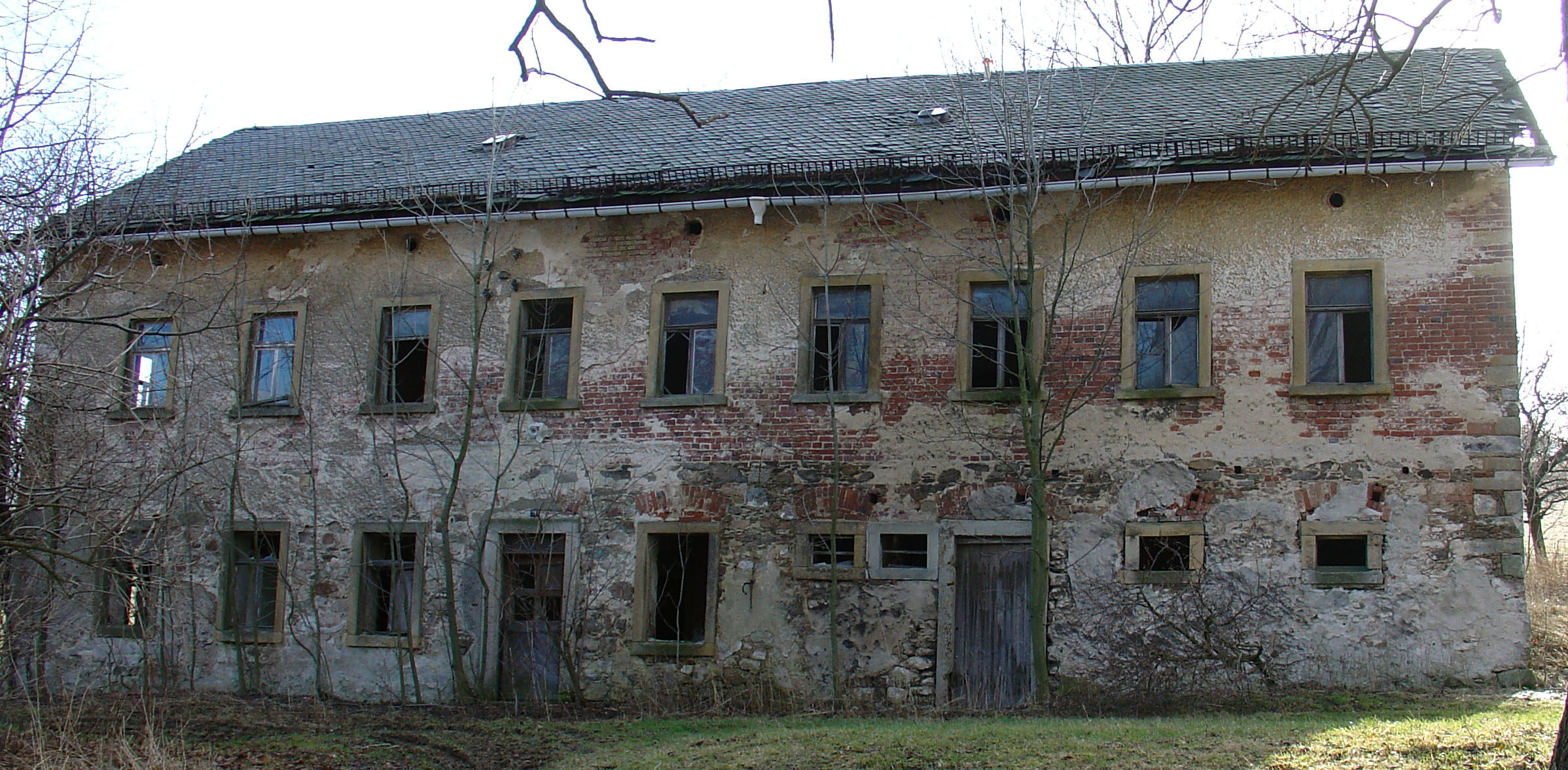 Jäpels Gasthof in Löwenhain (Altenberg/Geising)